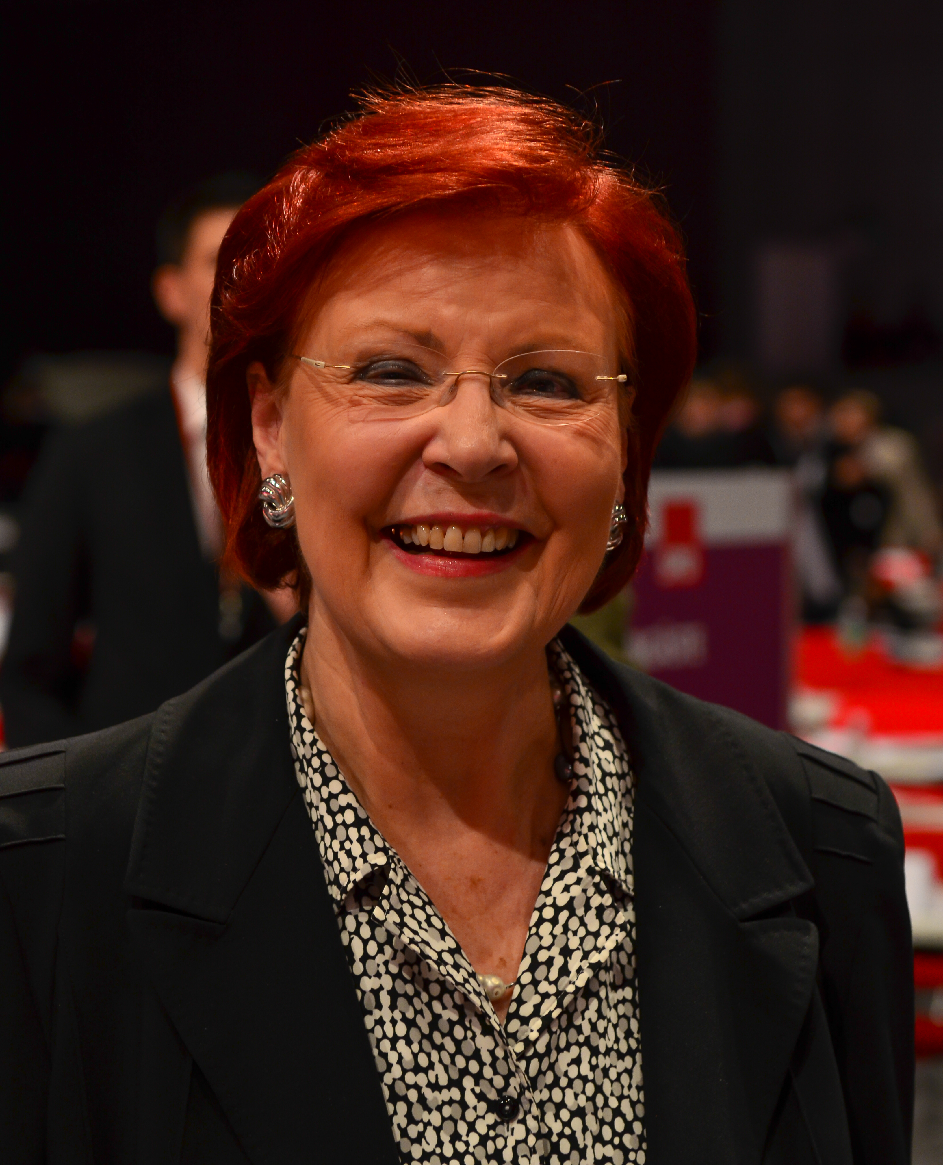 SPD Bundesparteitag 2013 in Leipzig (14.-16. November 2013); Neue Messe